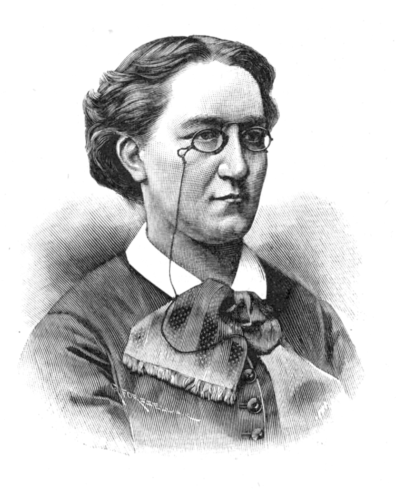 Rosina Heikel (1842-1929)